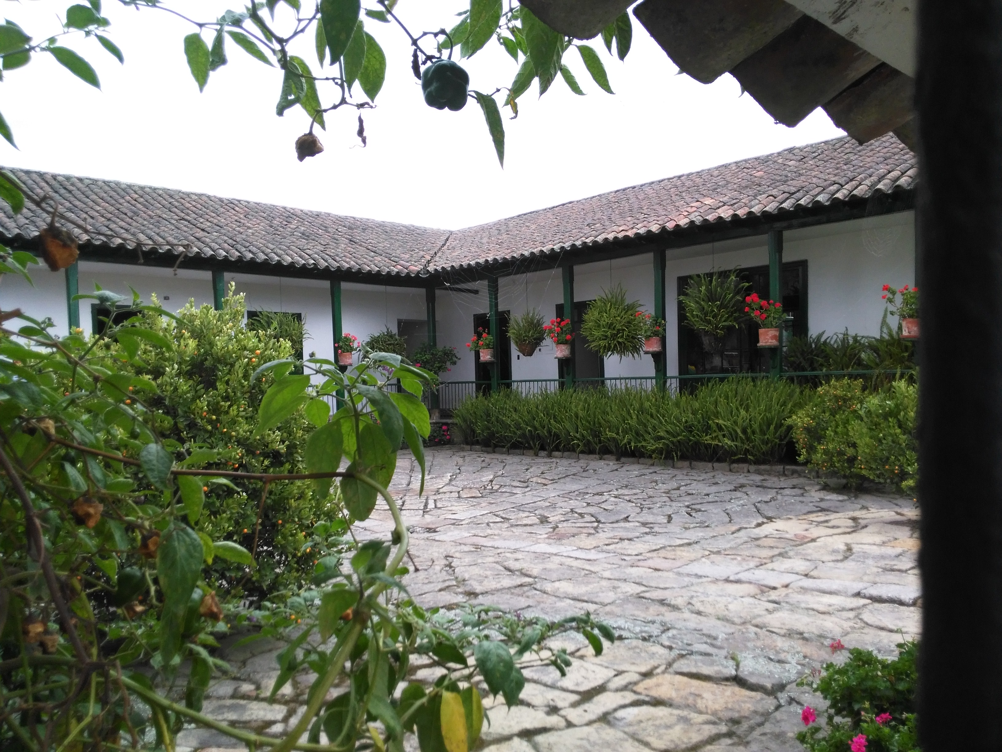 Fotografía del interior de la Hacienda Venecia en Mosquera Cundinamarca